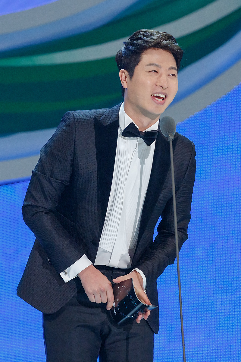 유상무 아역배우 김지영